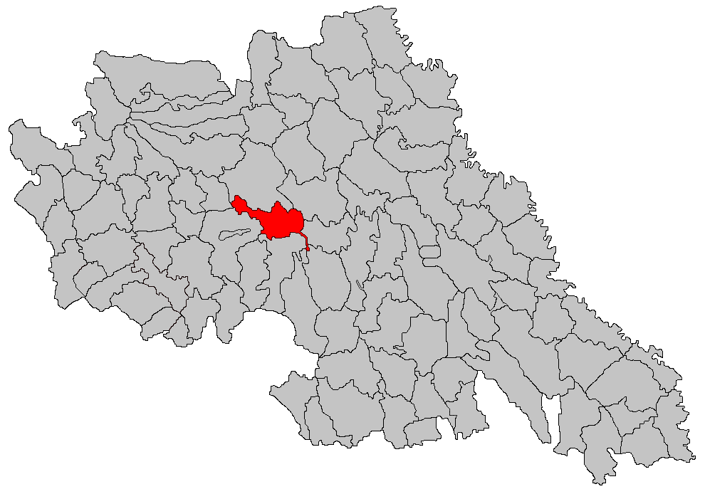 Categorie:Hărţi ale judeţului Iaşi